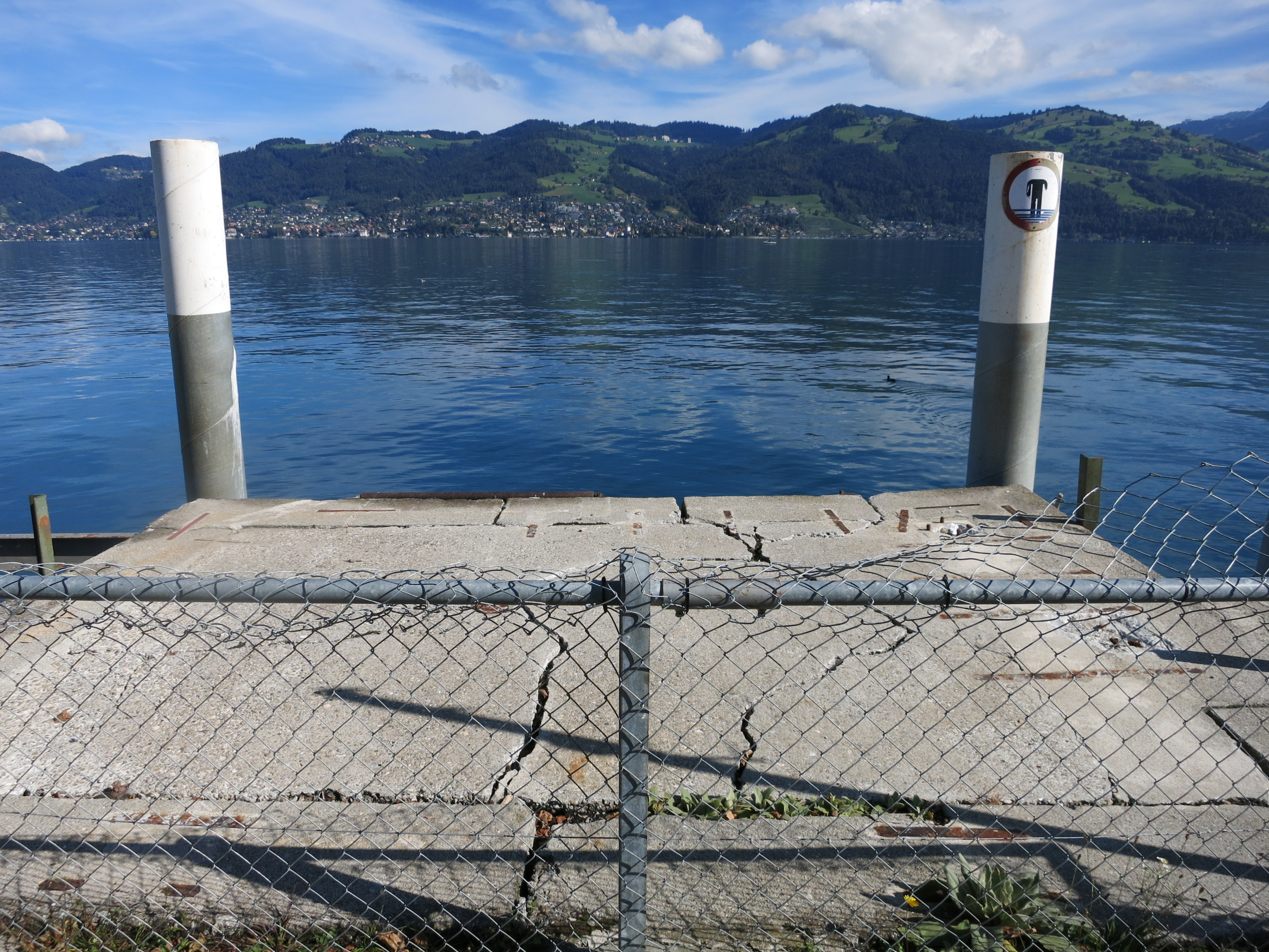 Schiffslandesteg Einigen, Spiez BE, Schweiz